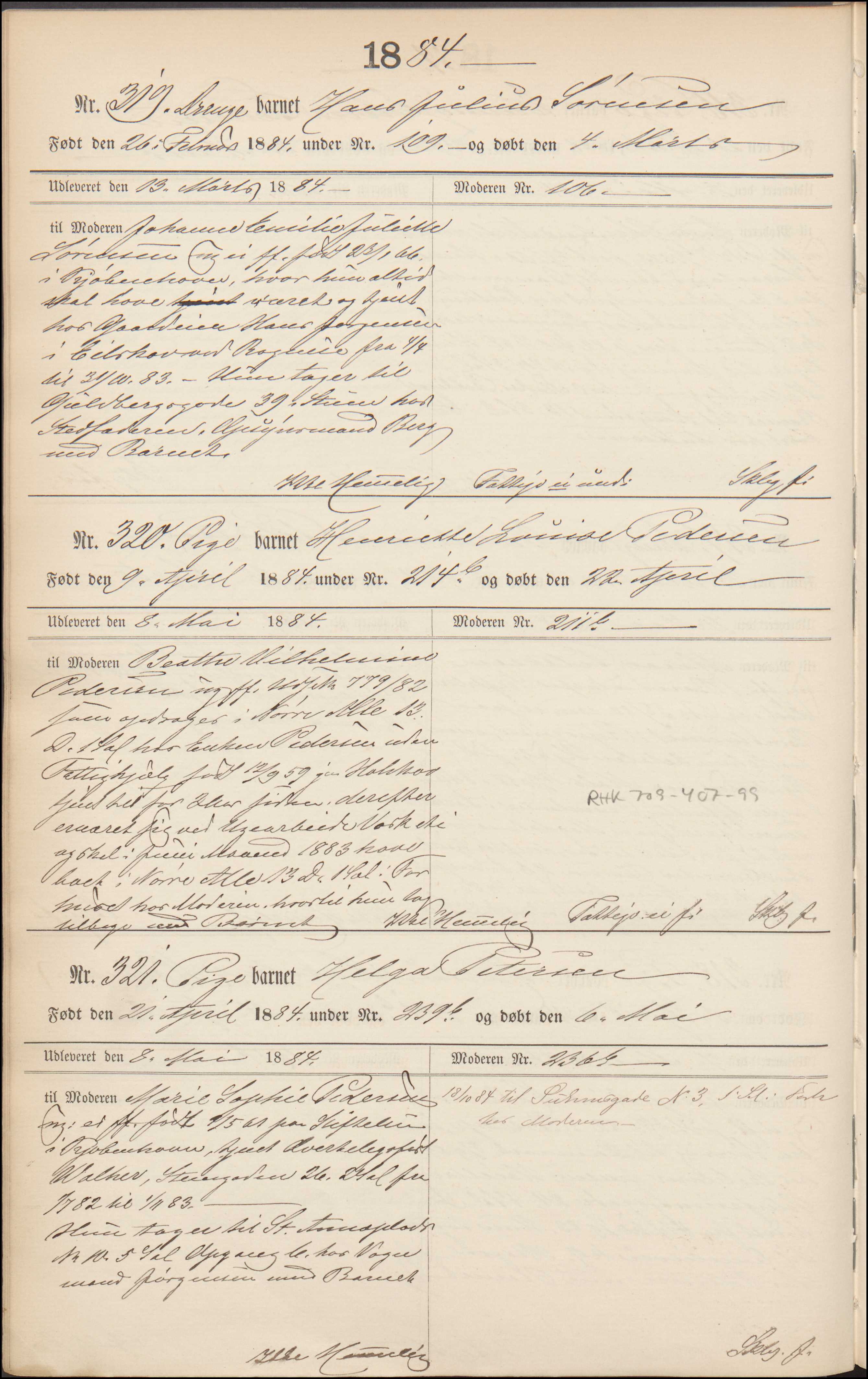 Udsætterprotokol fra Fødselsstiftelsen